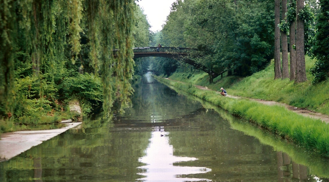 Photo personnelle / personal picture Canal de l'Ourcq dans la foret de Sevran / Ourcq canal in Sevran's wood Licensing Catégorie:Sevran